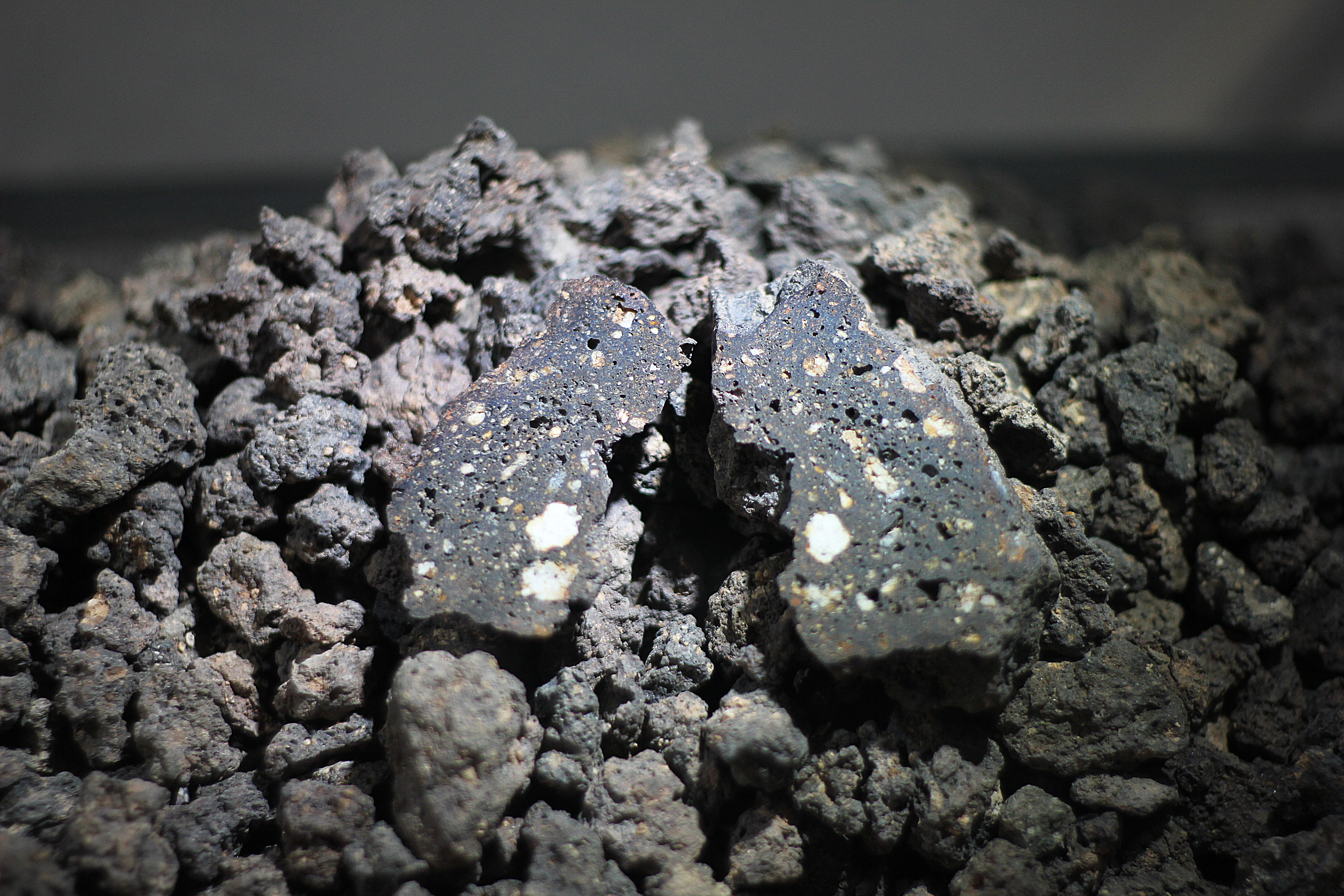 Impactites from Monturaqui Impact Crater. Museo del Meteorito, San Pedro de Atacama, Chile.